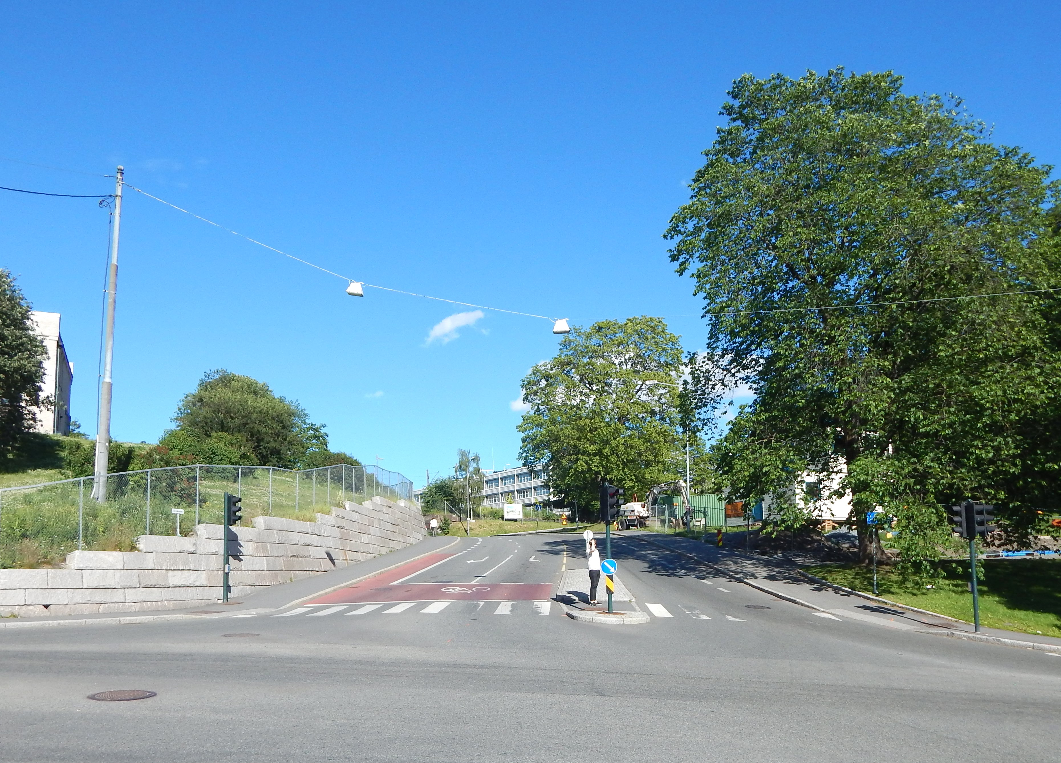 Ensjøveien sett fra Økernveien